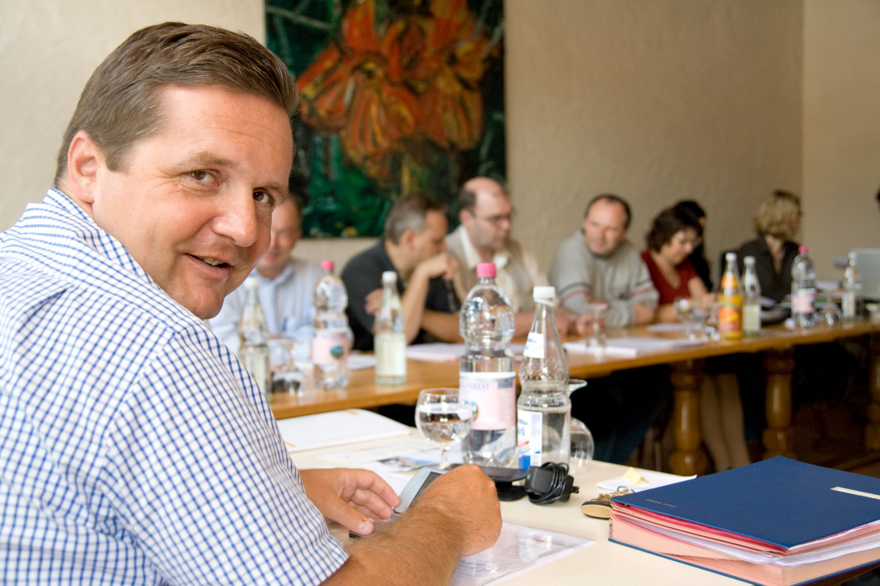 Stefan Mappus bei einer Sitzung des CDU-Kreisvorstands in Durbach